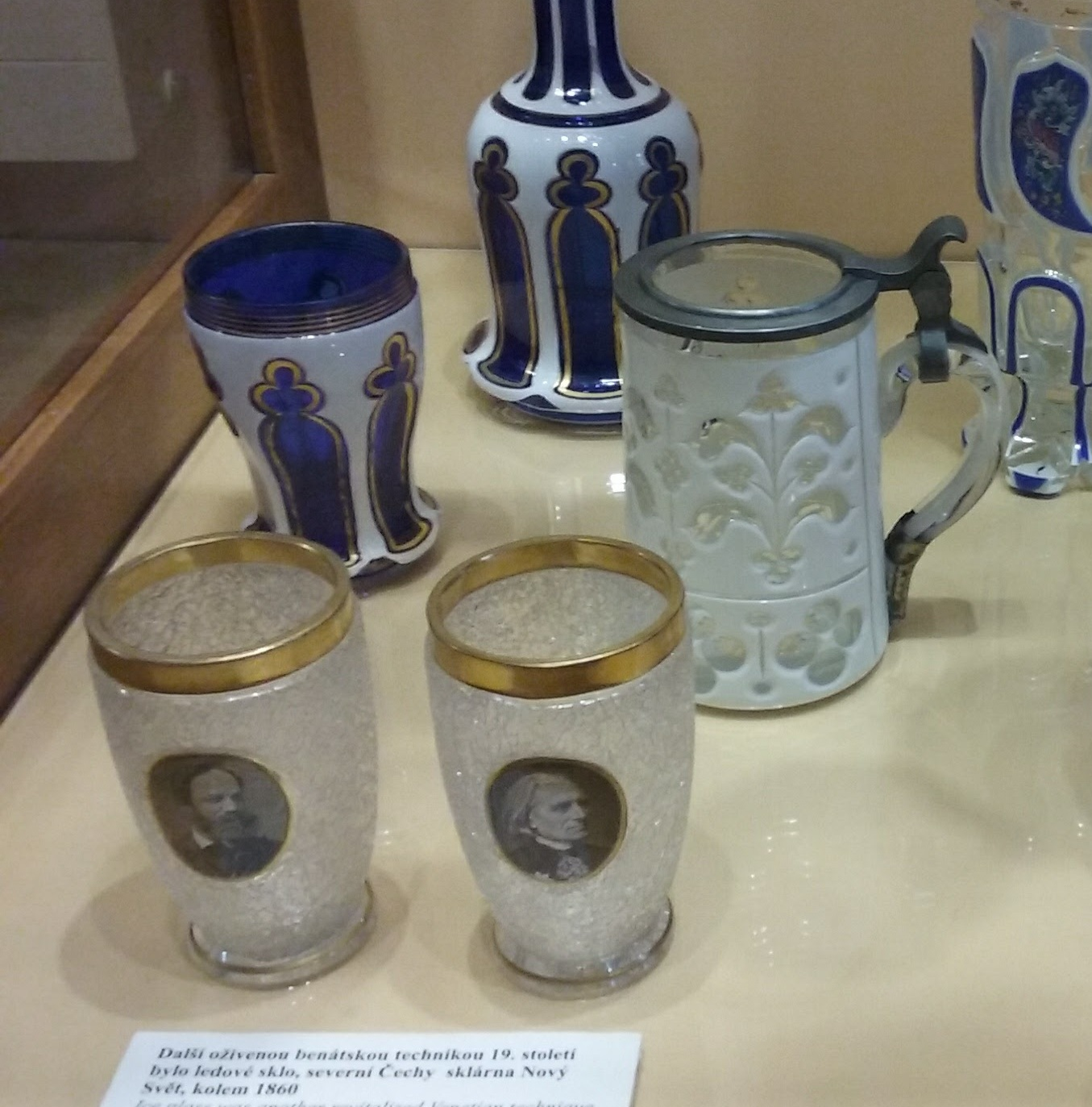 Historické sklo v muzeu v Sušici. Okres Klatovy, Česká republika.